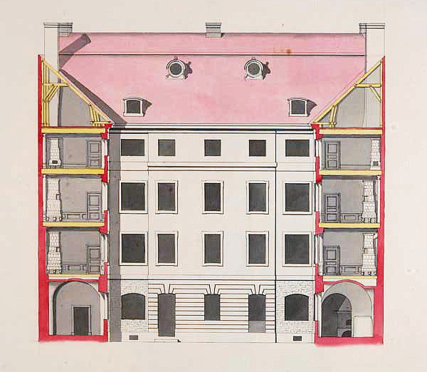 Per Westrell d.ä. Mästerstycke nummer 56